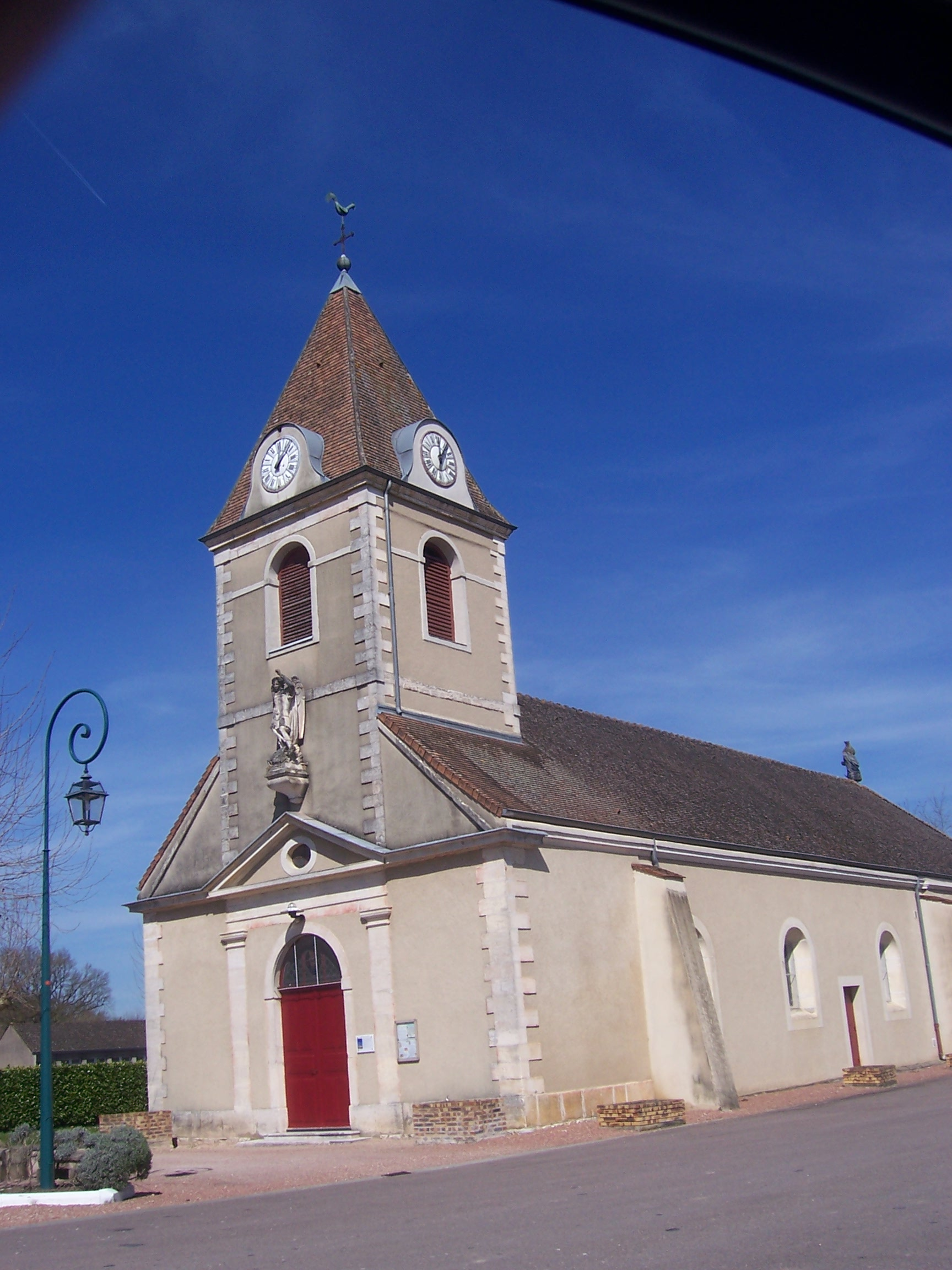 Eglise de Lessard-en-Bresse